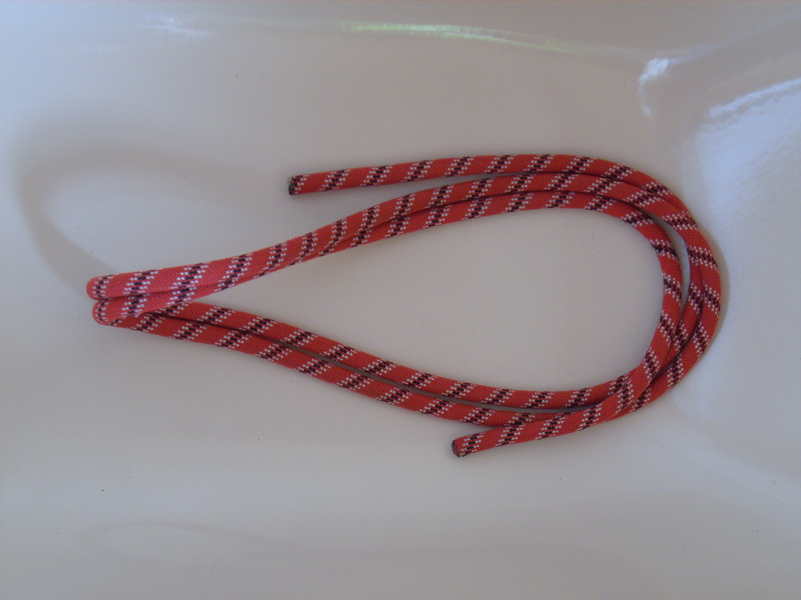 Leine aufschiessen mit verdrehten Buchten